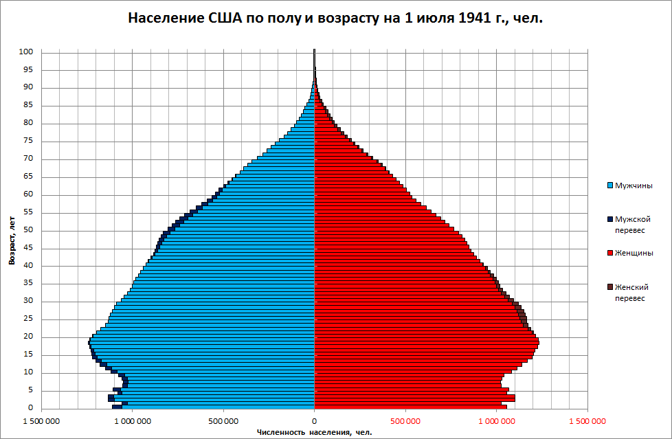 Демографическая пирамида США в 1941 г.